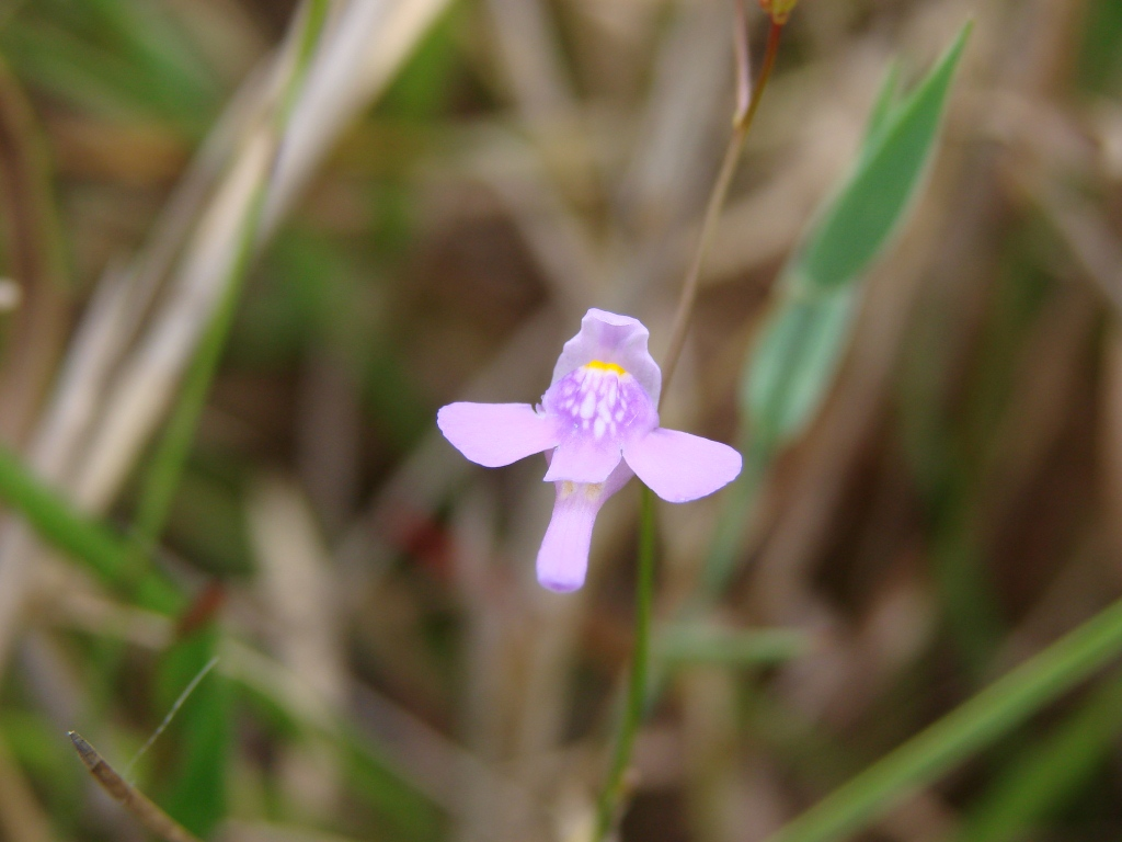 Utricularia amethystina Salzm. ex A.St.-Hil. & Girard - LENTIBULARIACEAE - Parque Estadual dos Pirineus - Pirenópolis - Goiás - Brasil.